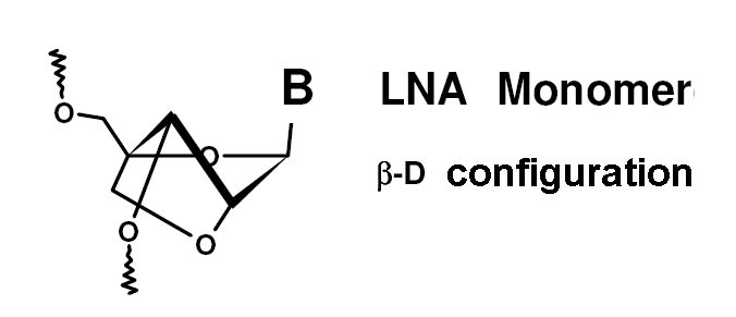 AchilleBroggi